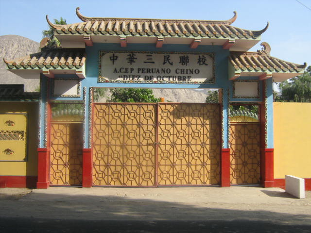 Centro de Esparcimiento y Recreación (Colegio Peruano Chino Diez de Octubre), Cieneguilla, Lima, Perú.